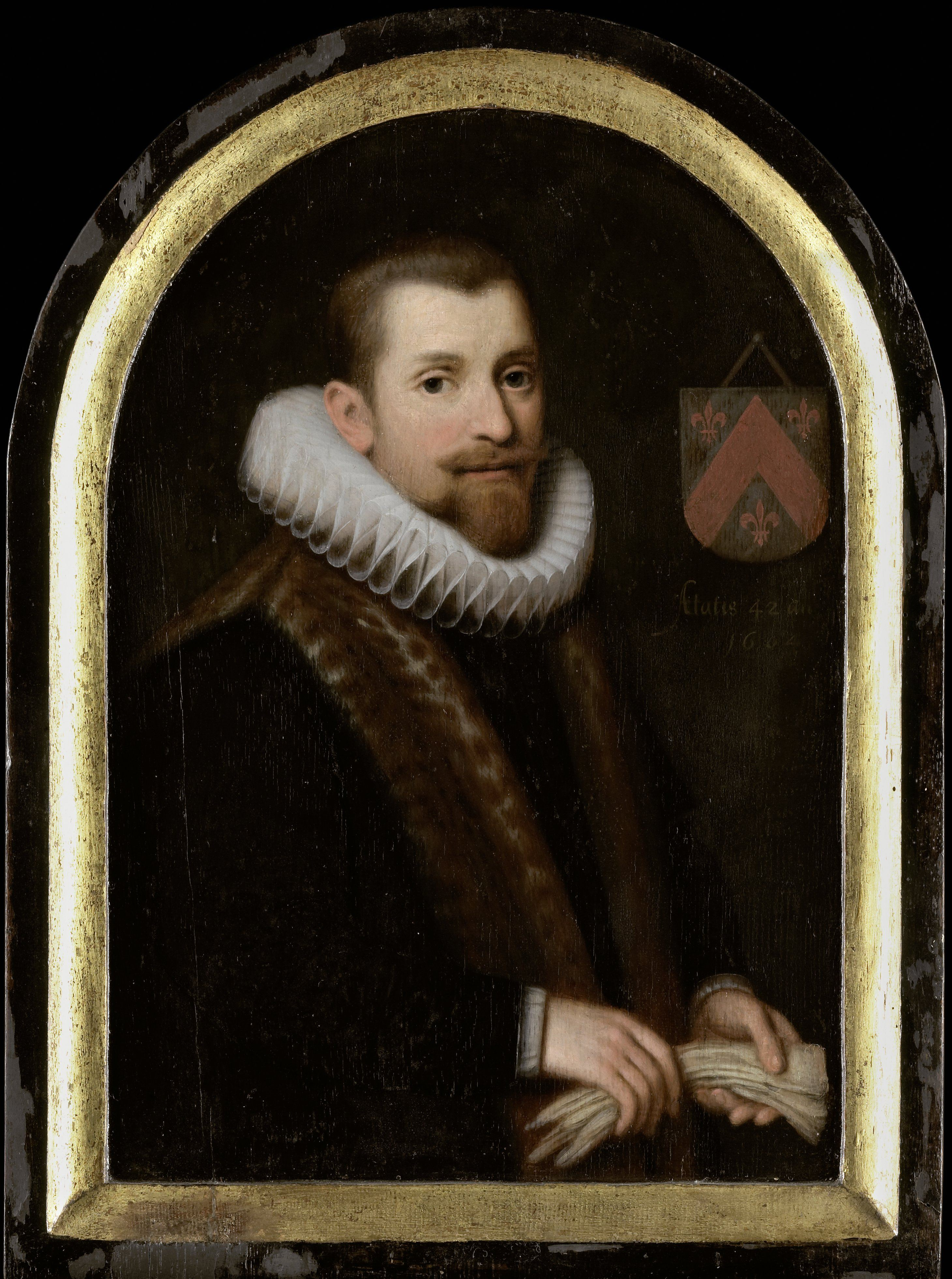 Portret van Floris Gerritsz Overrijn van Schoterbosch (c. 1562-1618). Ten halven lijve, naar rechts, handschoenen in de hand. Rechtsboven het familiewapen. Misschien een kopie door Cornelis Engelsz. naar een onbekende origineel uit 1604. Behoort tot een groep portretten: SK-A-4753 / SK-A-4754 / SK-A-4776 / SK-A-4772 / SK-A-4771 / SK-A-4756 / SK-A-4757 / SK-A-4773 / SK-A-4758 / SK-A-4759 / SK-A-4775 en SK-A-4774.